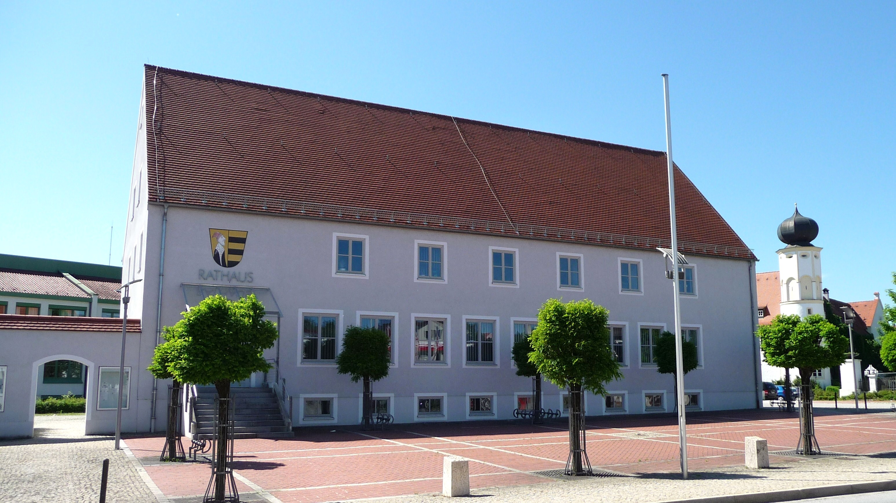 Das Rathaus von Neufahrn